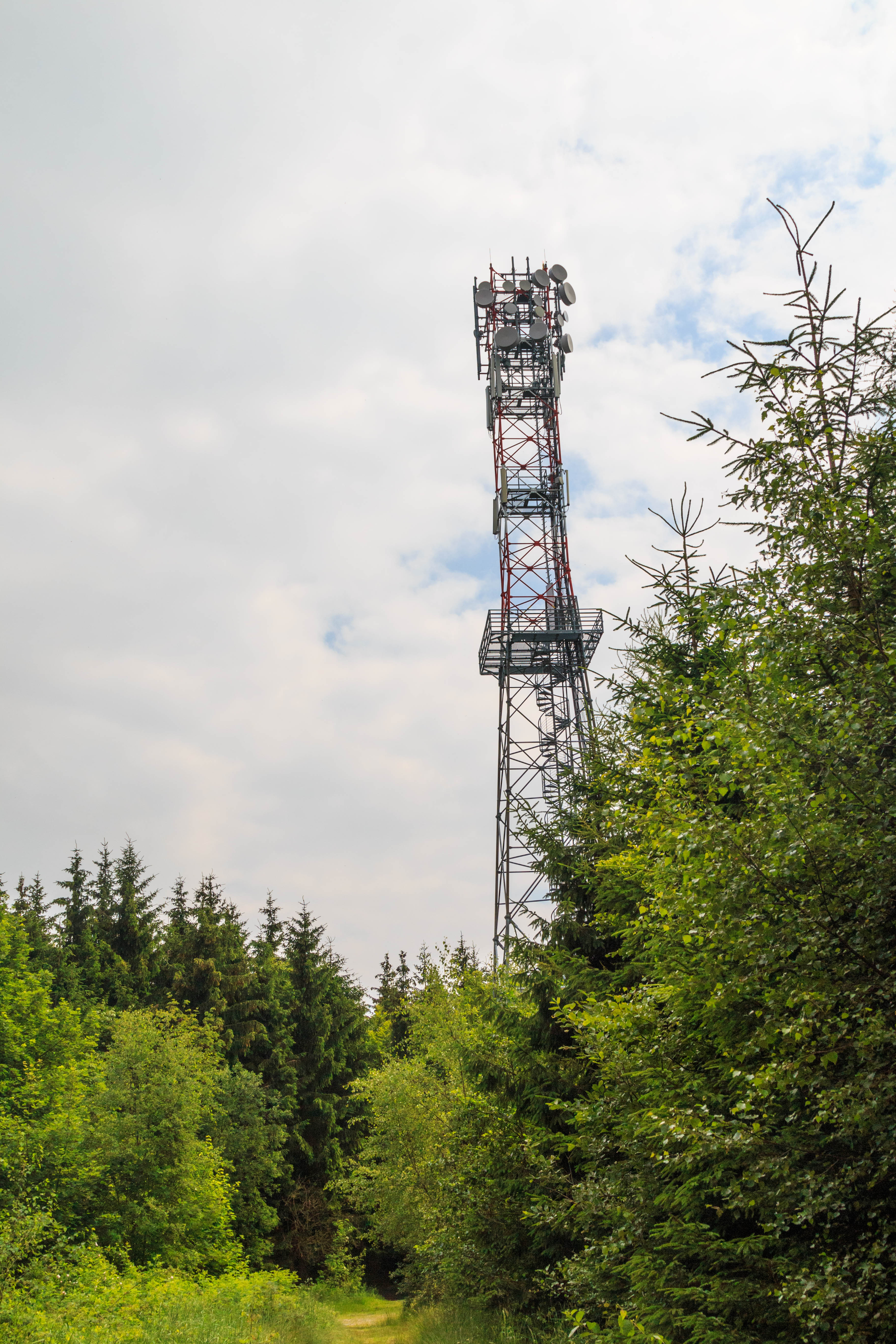 Rozhledna Sendraž